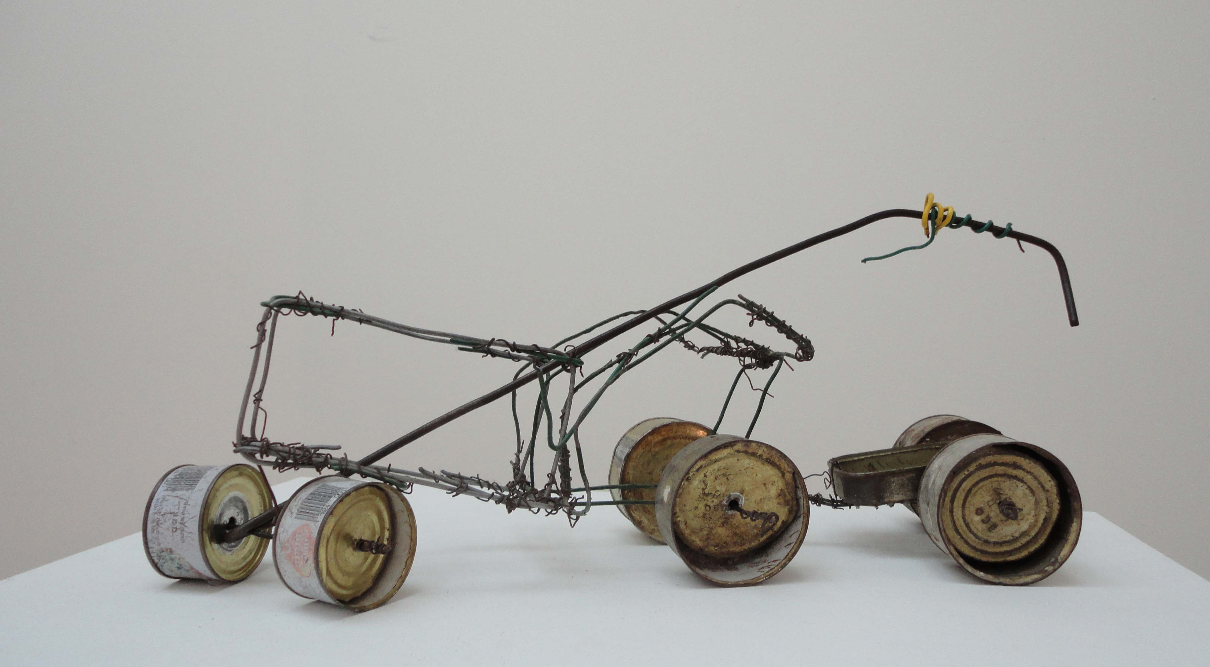 צעצוע נגרר (שנות השמונים) מאת אמן אנונימי (יליד דרום הר חברון), אוסף מוזיאון ישראל, שאילה ארוכת טווח מאת סנאטור ג'וזף ברוך סילבר, ירושלים.